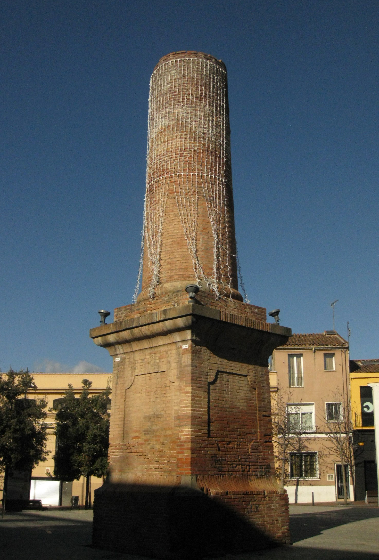 Sala Muncunill (Terrassa)